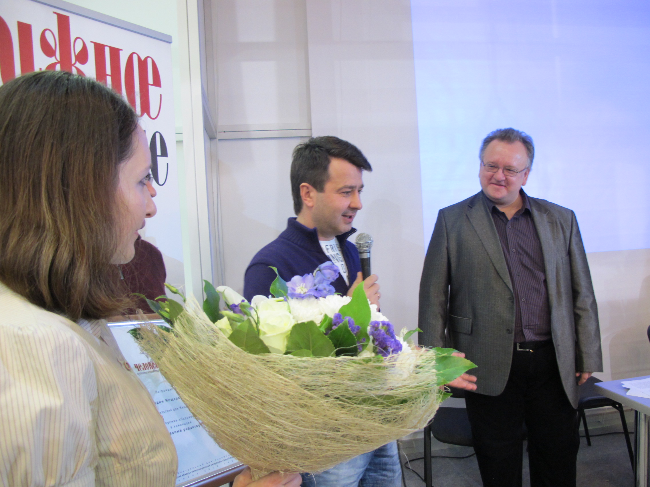 Вадим Мещеряков получает премию «Человек книги» 2012 года в номинации «Главный редактор». Справа — главный редактор газеты «Книжное обозрение» Александр Набоков.